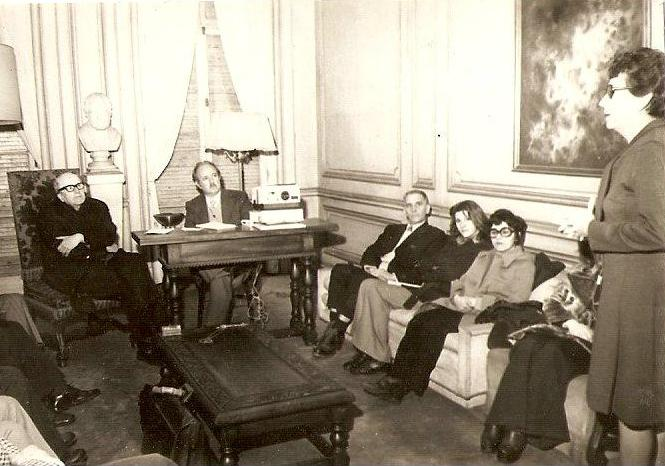 Hugo Gunckel izquierda, Niemeyer (derecha al fondo), Luisa Eugenia Navas Primer plano